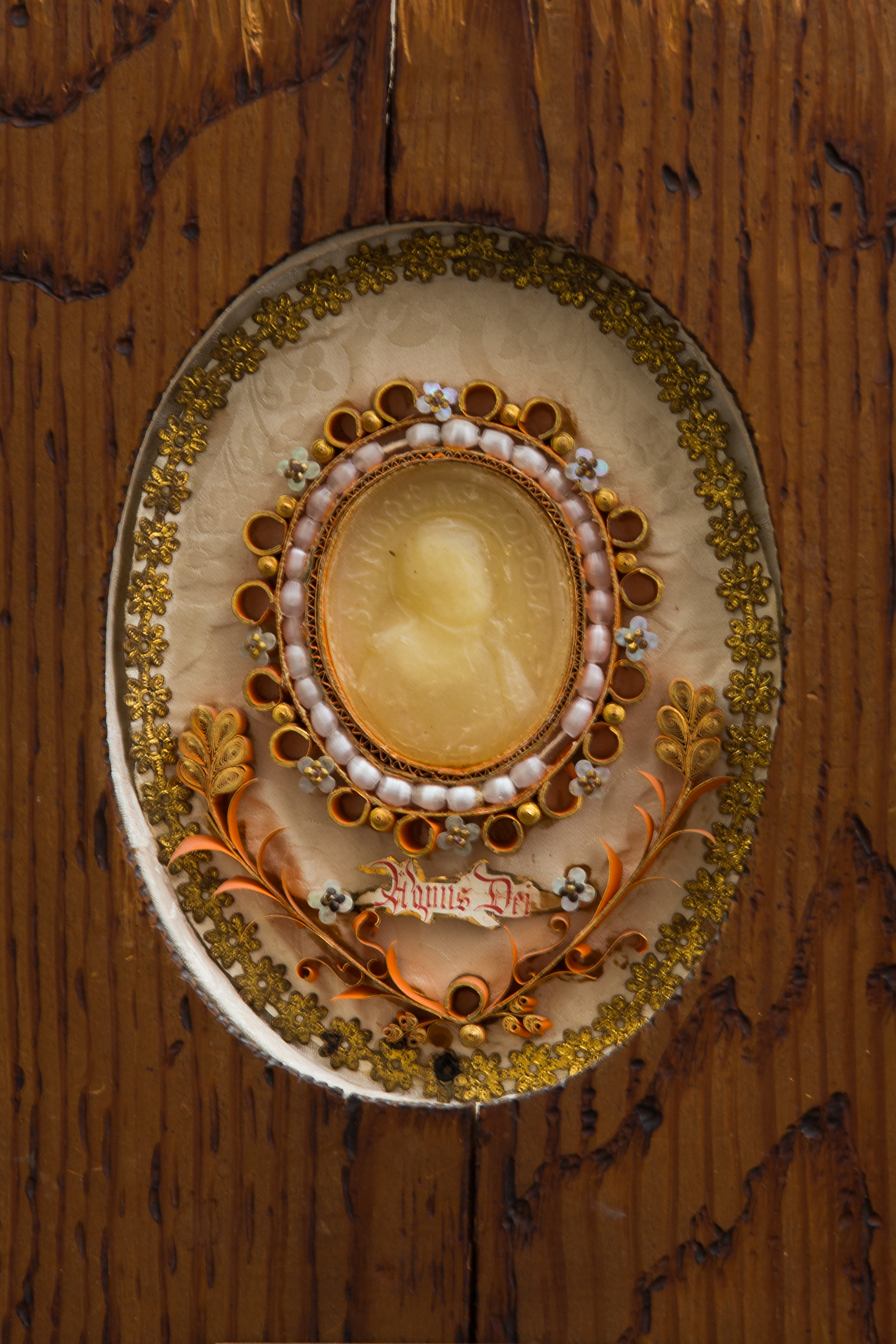 Agnus Dei représentant Saint André Bobola. Époque inconnue. Saint André Bobola, né le 30 novembre 1591 à Strachocina (Pologne) et mort (assassiné) le 16 mai 1657 à Janow Podlaski (Pologne), était un prêtre jésuite polonais. Travaillant au rapprochement entre orthodoxes et catholiques il fut torturé et assassiné en haine de la foi catholique. Il est un des saints patrons de la Pologne. Canonisé par le pape Pie XI en 1938 il est liturgiquement commémoré le 16 mai.